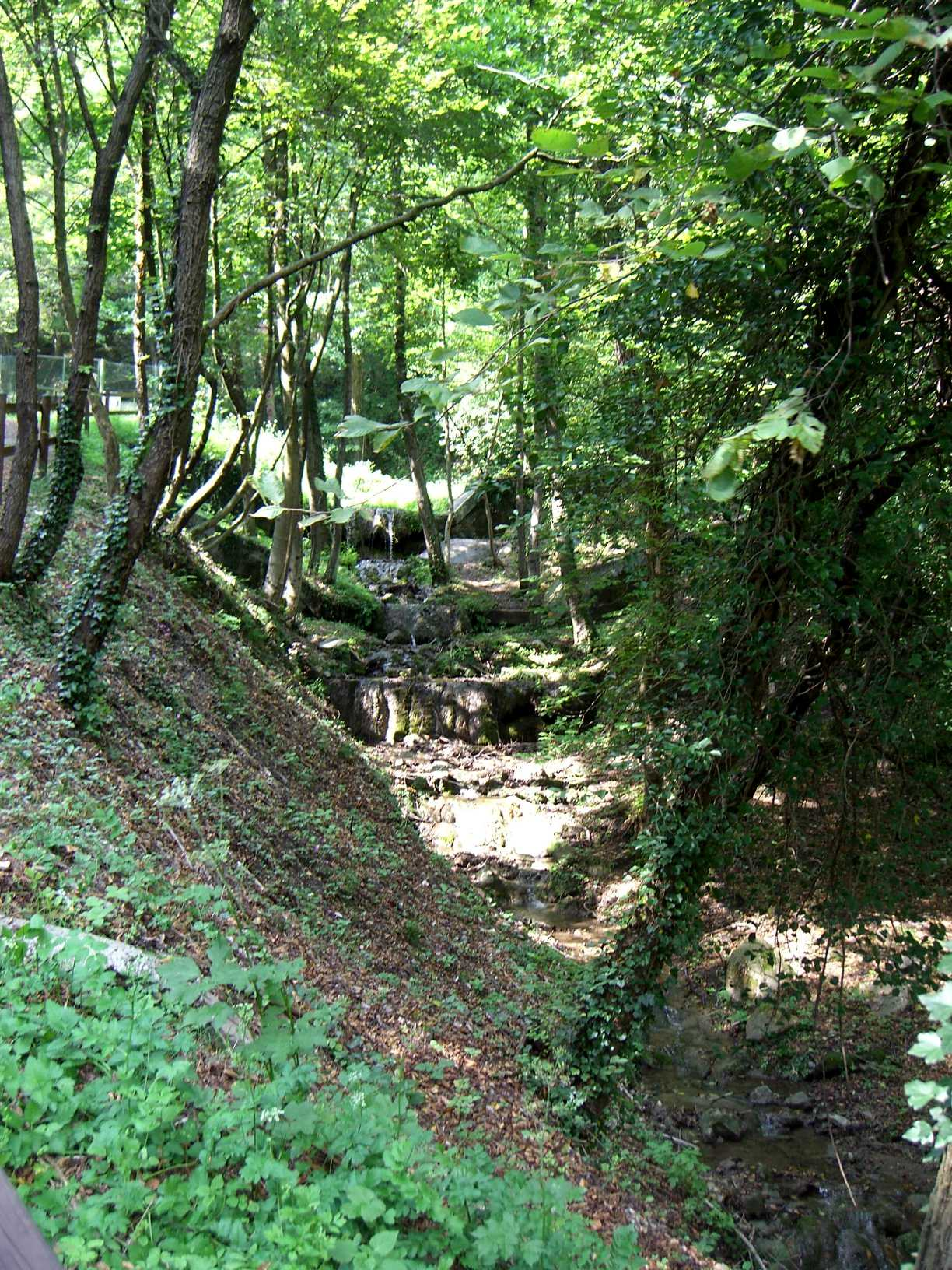 Spinone al Lago - Valle del Tuf - ruscello d'acqua sorgiva sulfurea nei pressi della Fonte spinosa